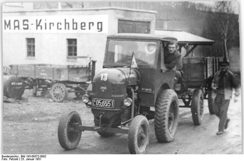 MAS Kirchberg, ifa-Traktor Illus Petzold 23.1.1951 MAS Kirchberg-Republiksieger im Wettbewerb der Maschinen-Ausleih-Stationen und volkseigenen Güter der Republik.